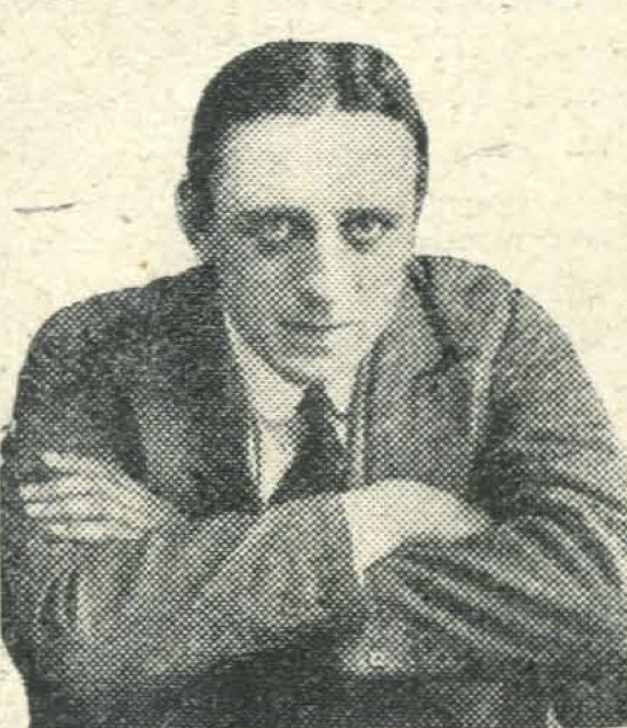 Bertram Burleigh in a 1919 magazine: Cinema Chat